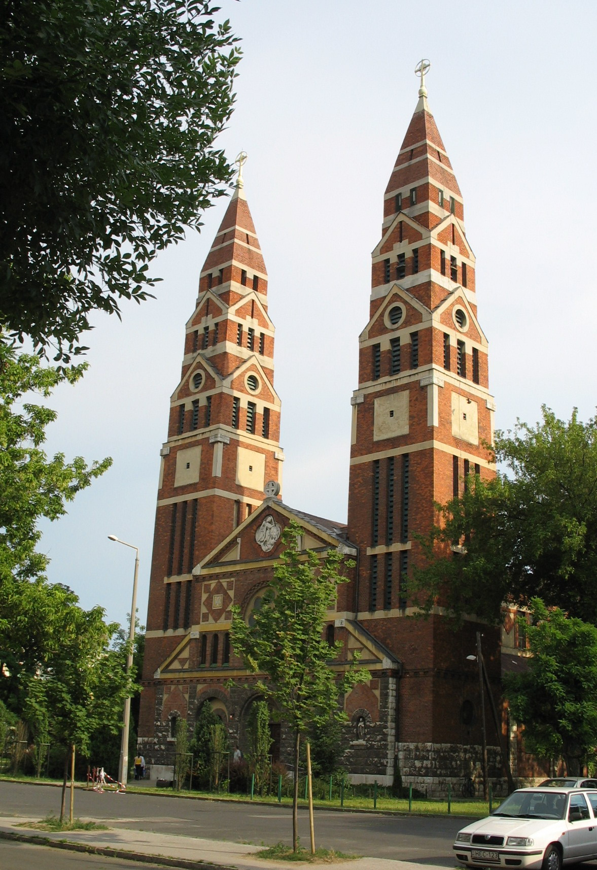 Szent Mihály katolikus templom. Budapest Babér utca, Foerk Ernő, 1930 .